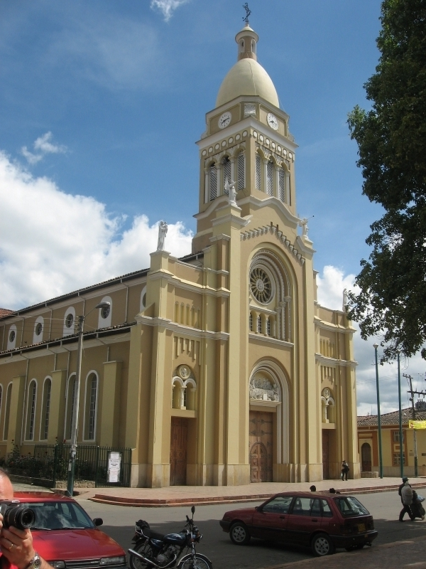 Catedral Cajica Cundinamarca (Colombia).